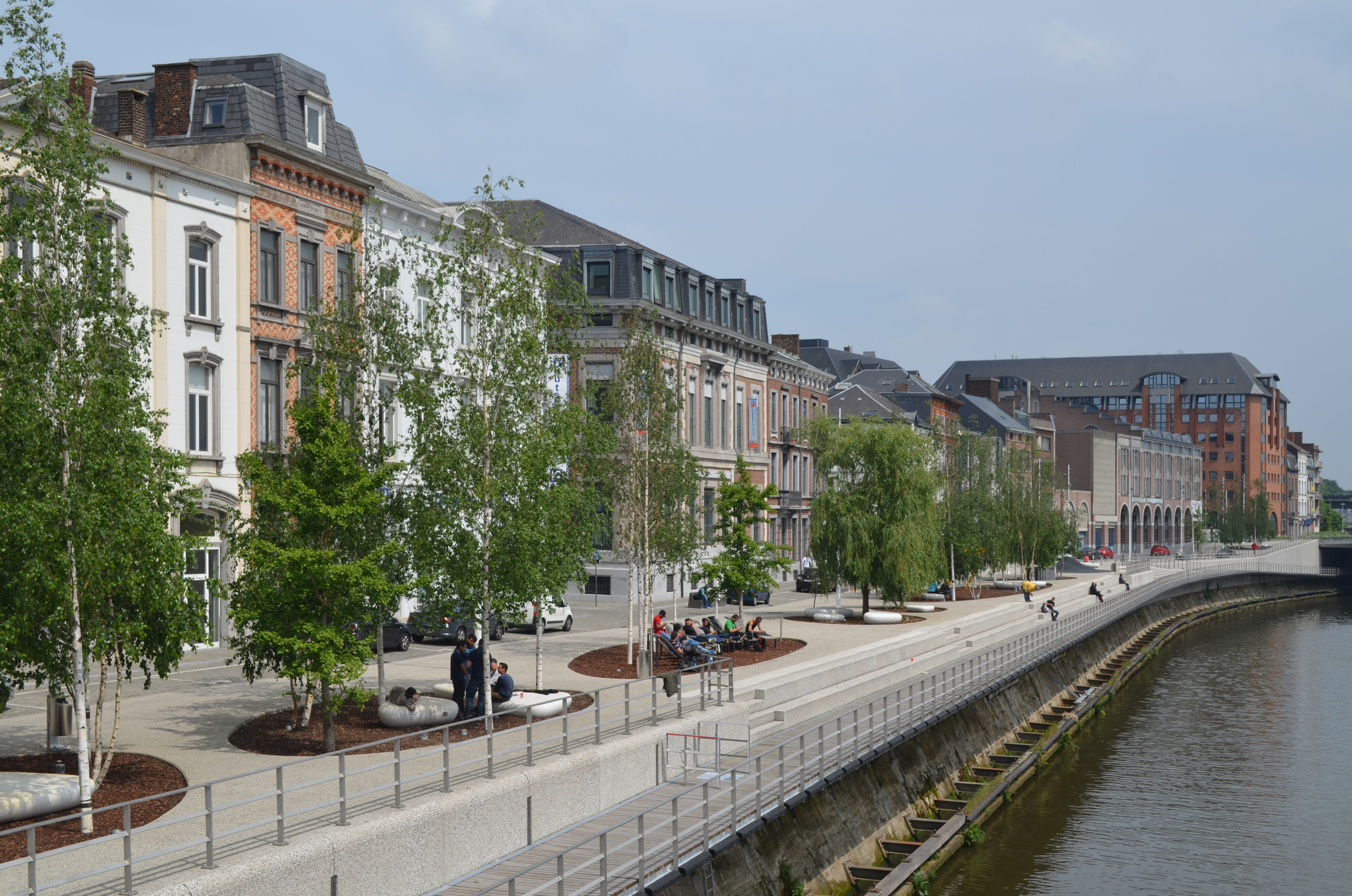 Charleroi (Belgique) - quai de Brabant